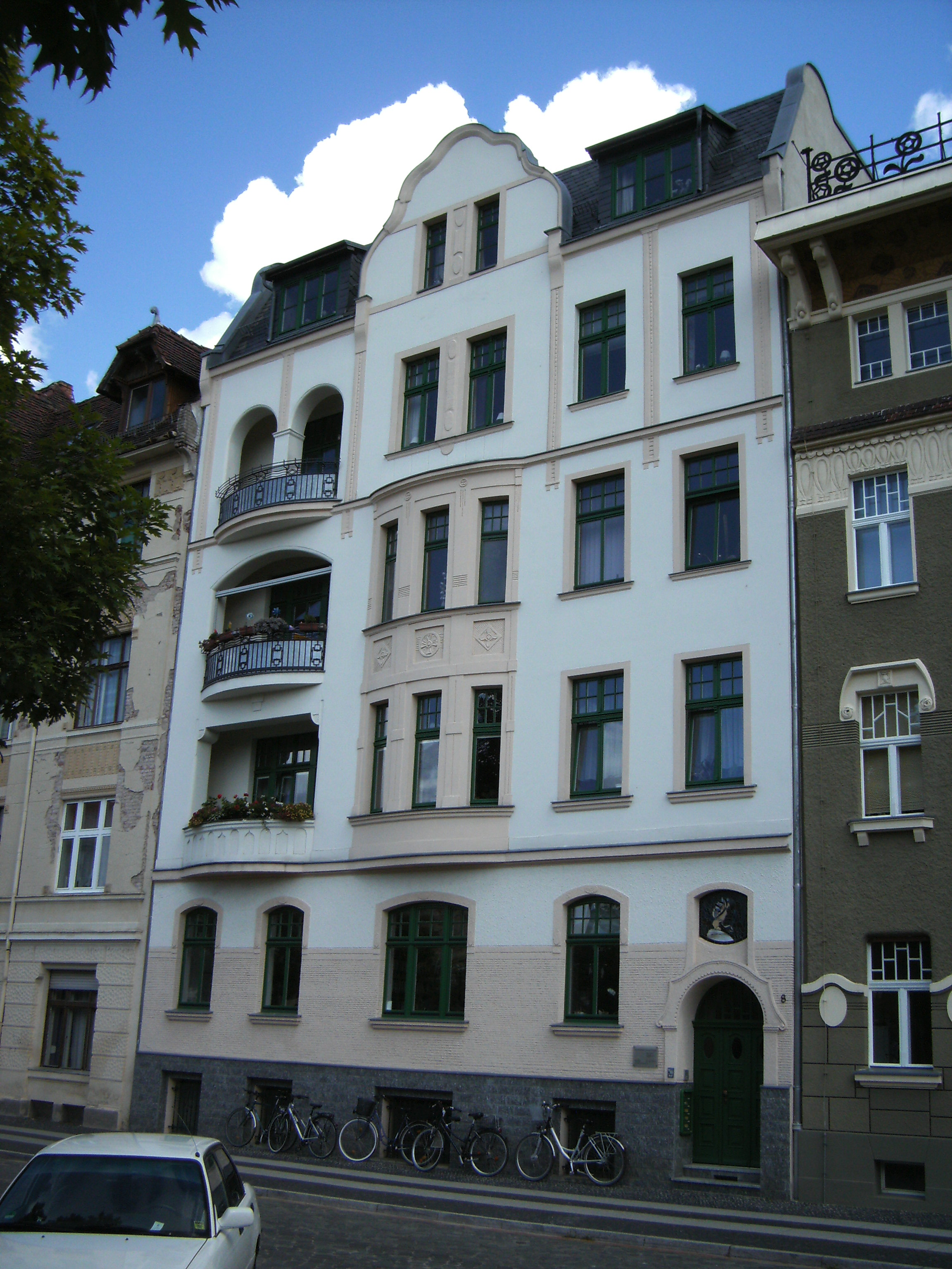 Wernerstr. 8